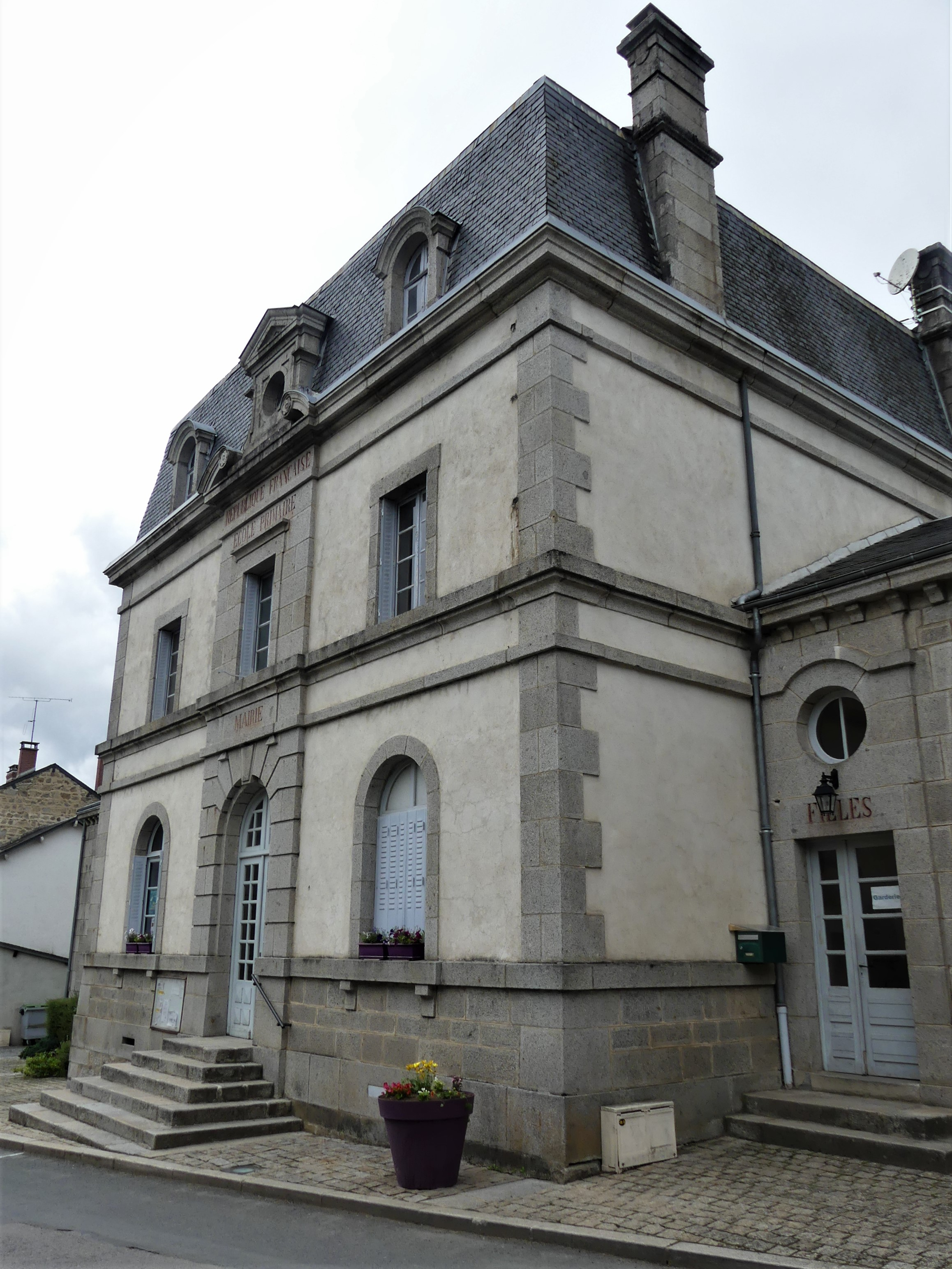 La mairie de Magnat-l'Étrange, Creuse, France.